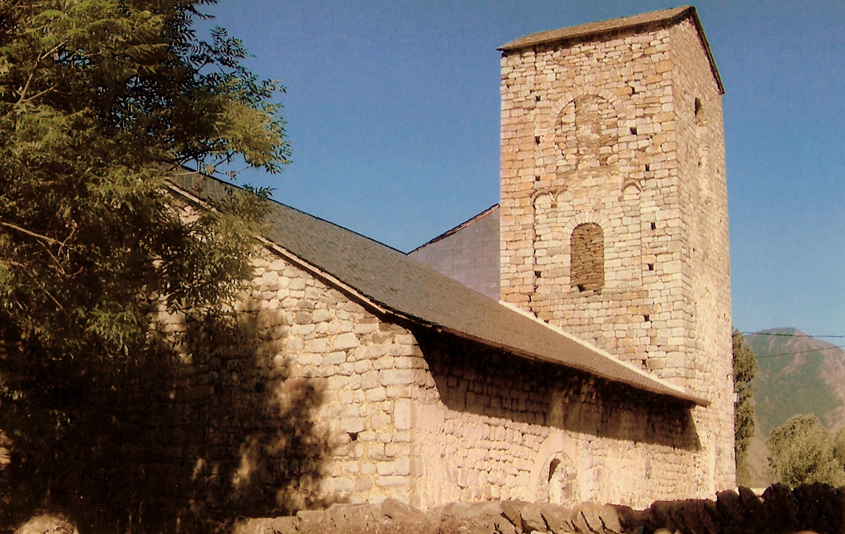 SORPE - Església de Sant Pere. Ha estat objecte de moltes transformacions, però de la qual es pot datar l´origen en el segle XII. És un edifici de tres naus, cobertes amb un embigat, i si originàriament estaven capçades per tres absis semicirculars, avui només se´n conserva un, el lateral nord; el central i i el lateral sud van desaparèixer. En realitat, es va capgirar el sentit de la nau, col-locant el presbiteri a ponent i l´únic absis, dedicat a baptisteri. Per això mateix la porta d´accés s´obre ara al lloc on hi havia l´absis central; tot un embolic. El campanar, refet el 1725, és una torre prismàtica. En el campanar, que ocupa un lloc singular, a l´extrem de llevant de la nau sud, davant de l´embocadura de l´absis, del qual només es conserva l´arc presbiteral. A l´interior de l´església hi trobarem dues piques : una de baptismal, en una cambra lateral, que presenta una decoració vegetal en el vas, molt gran, d´uns 125 cm de diàmetre, i que té al suport una mena de capitell decorat amb rostres difícils de reconèixer; l´altra pica és d´oli i és a l´entrada de l´església, formada per una pedra que serveix de base, probablement una estela, decorada amb una figura humana dibuixada fins els genolls; el vas, en forma rectangular i escapçat (46 x 31 cm), està decorat amb figures d´animals : un lleó amb rostre humà i els peus d´un altre animal estirat o a punt de saltar. També cal destacar l´important retaule renaixentista de l´altar major.